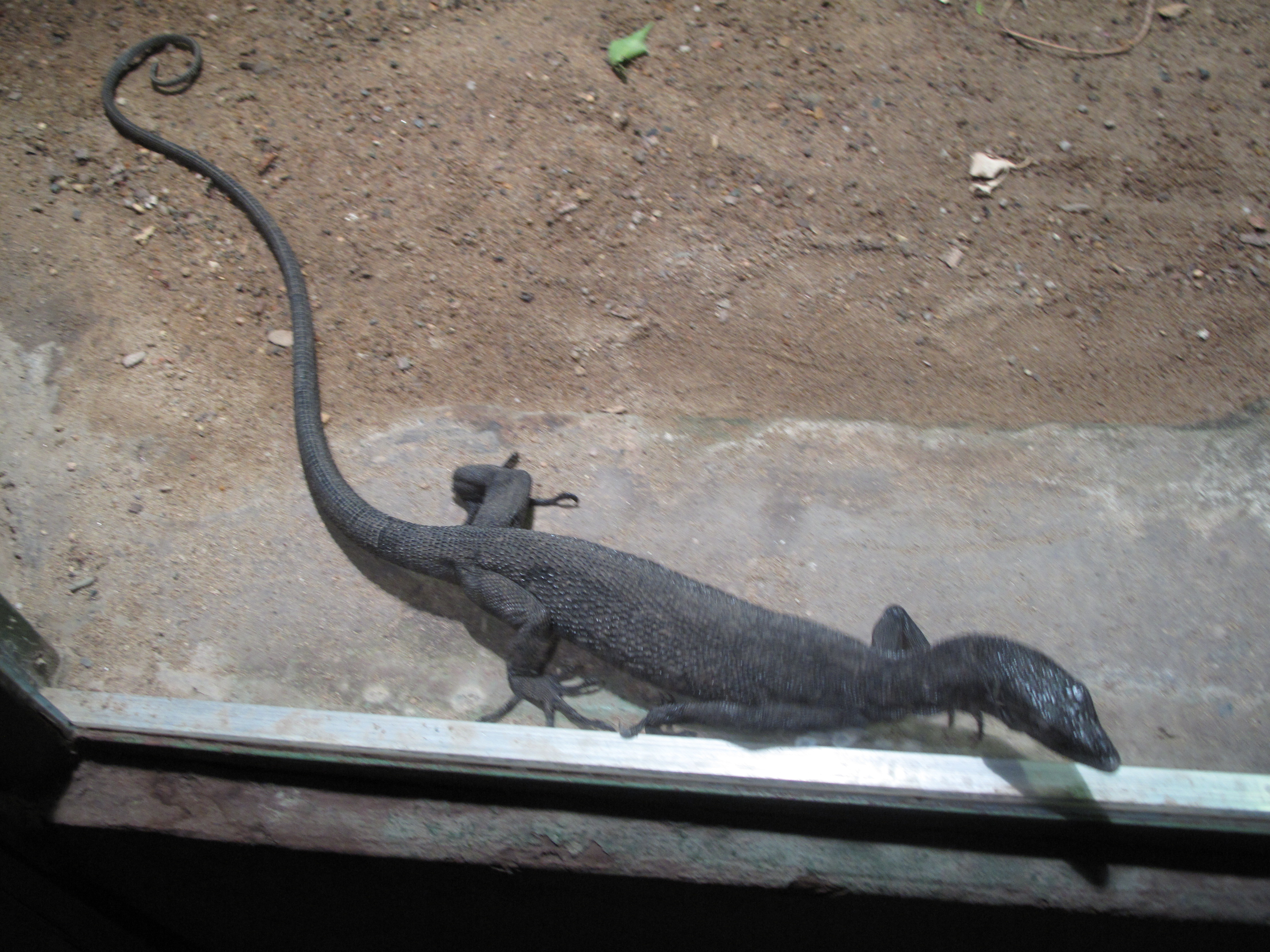 Zoo Praha